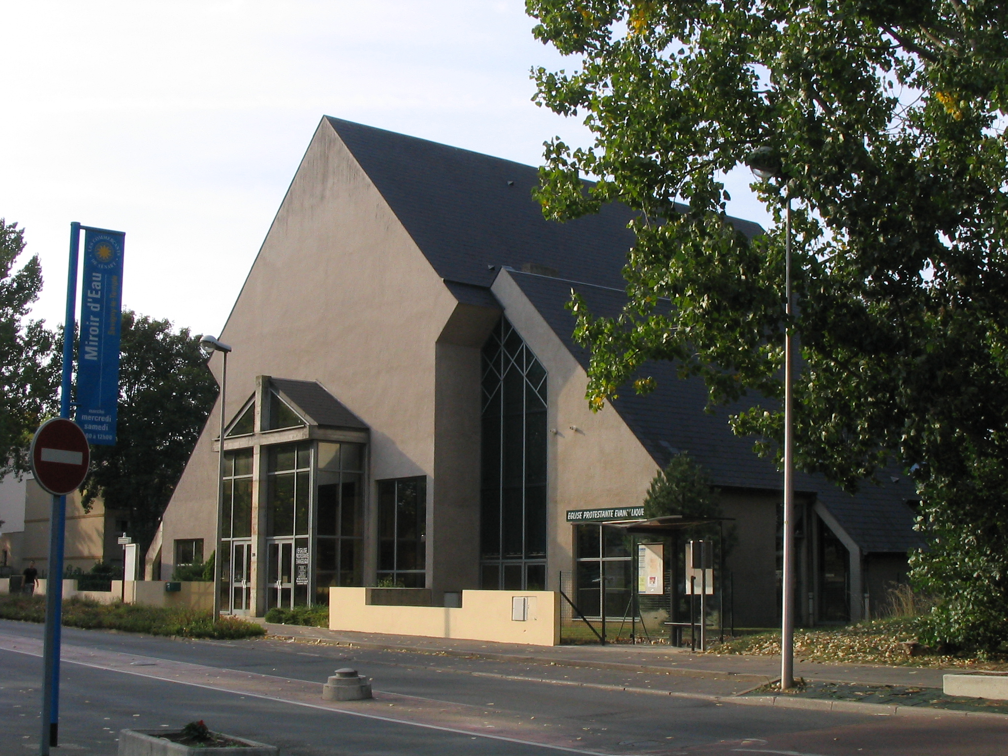 Temple protestant à Savigny-le-Temple, France(avenue du Général de Gaulle). Author:User:Tej